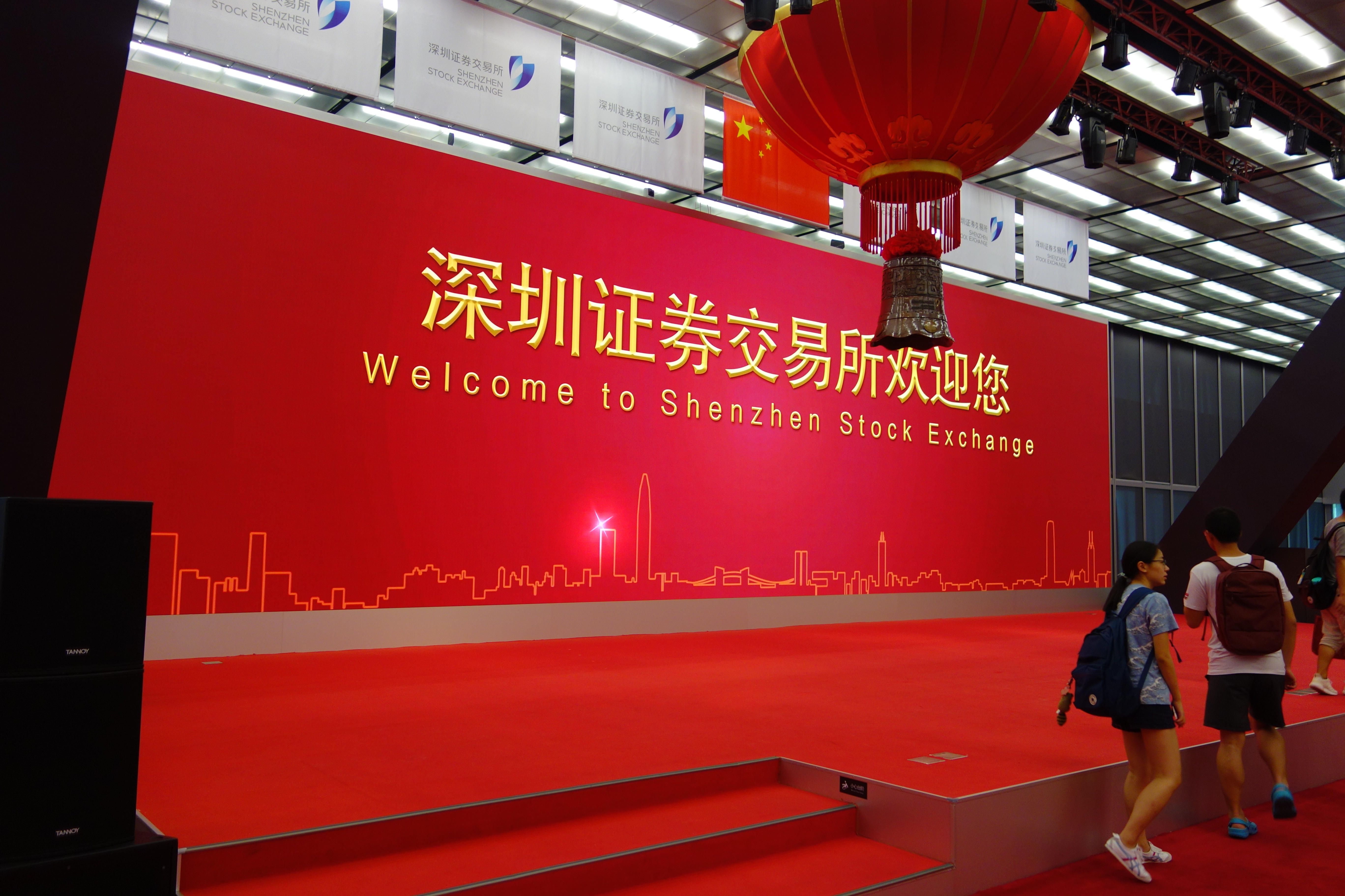 View inside Shenzhen Stock Exchange Hall.